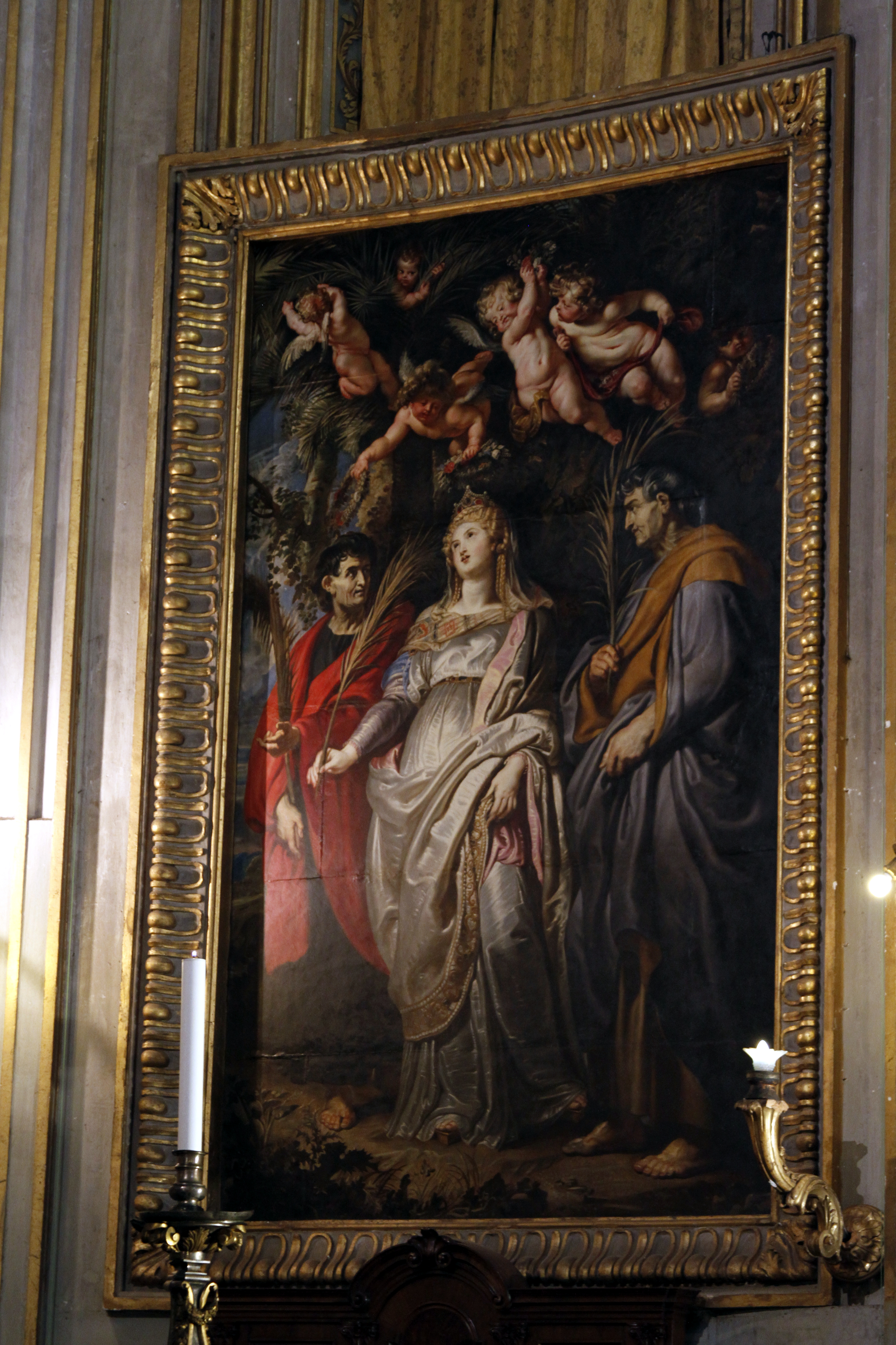 Chiesa Nuova - Rome